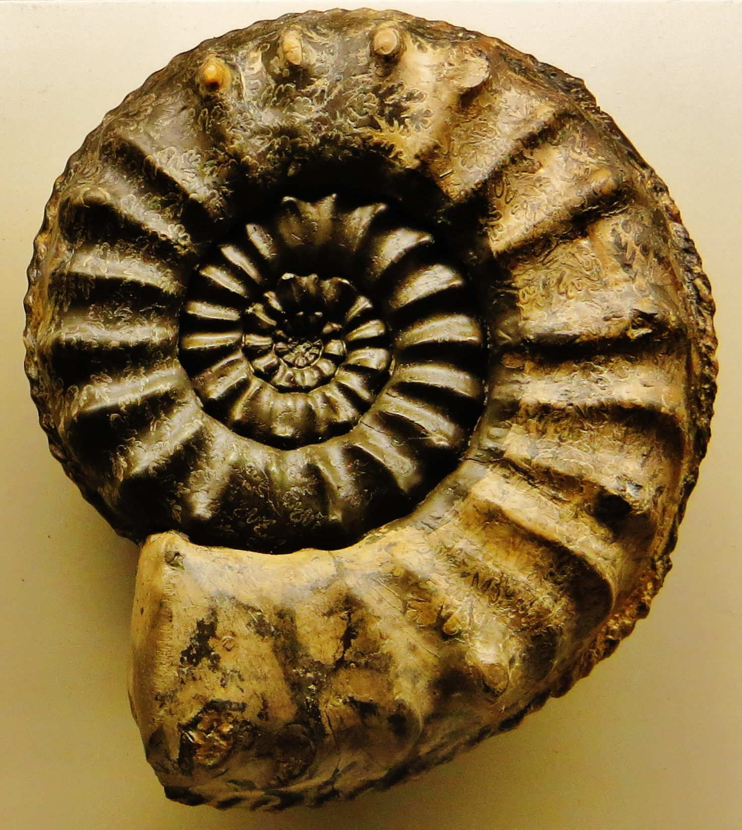 Took the picture at Jura-Museum, Eichstaett